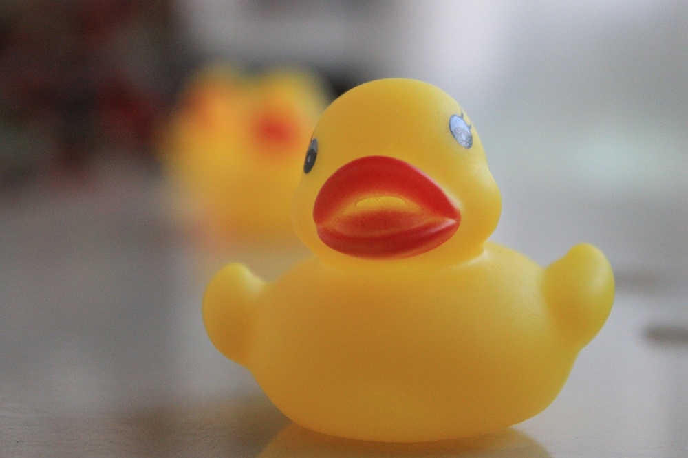 Un pato enfocado delante de otros dos completamente desenfocados, esto se consigue manipulando el enfoque de la cámara manualmente o mediante el follow focus